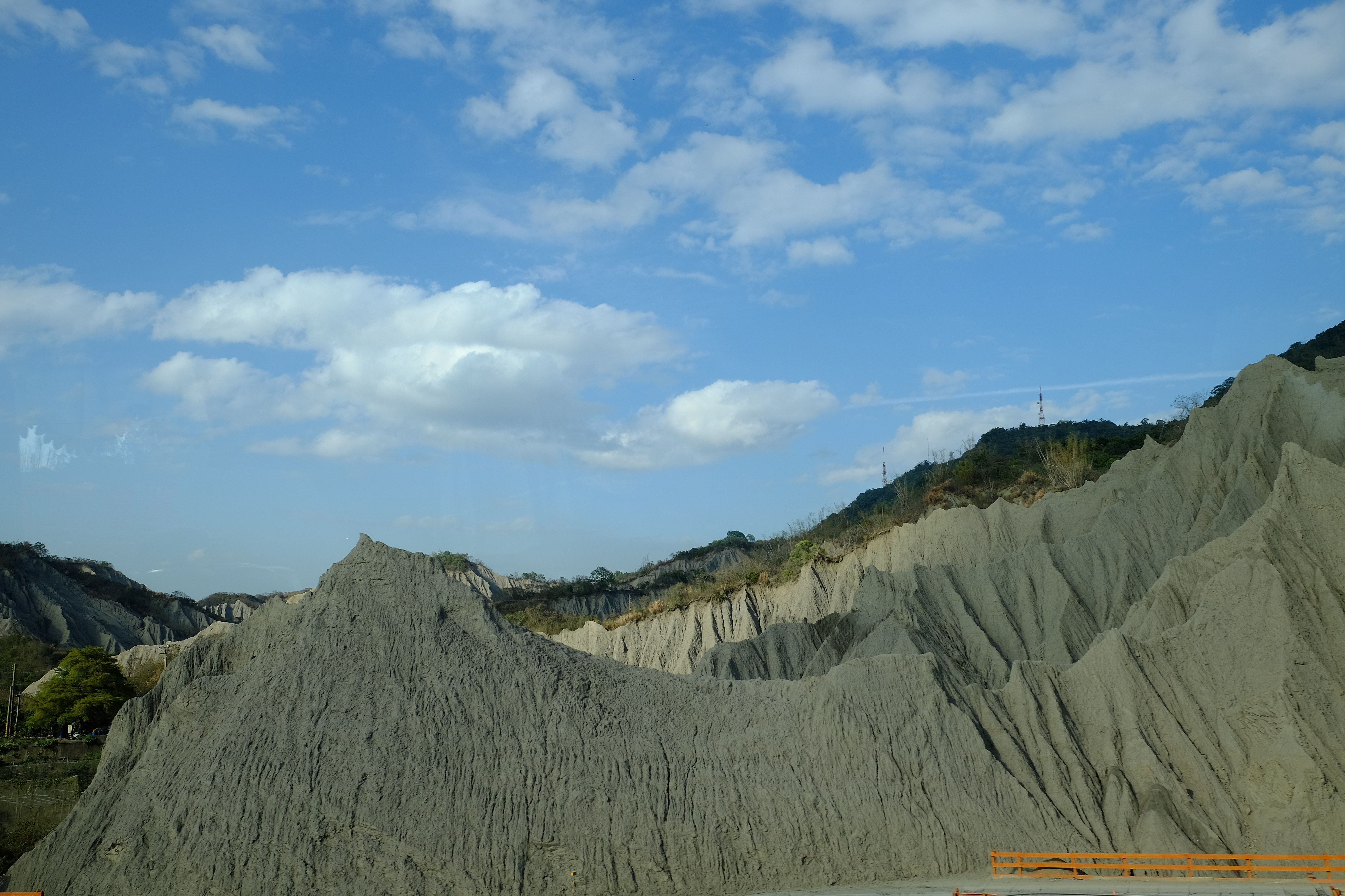 Tianliao Moon World 2018